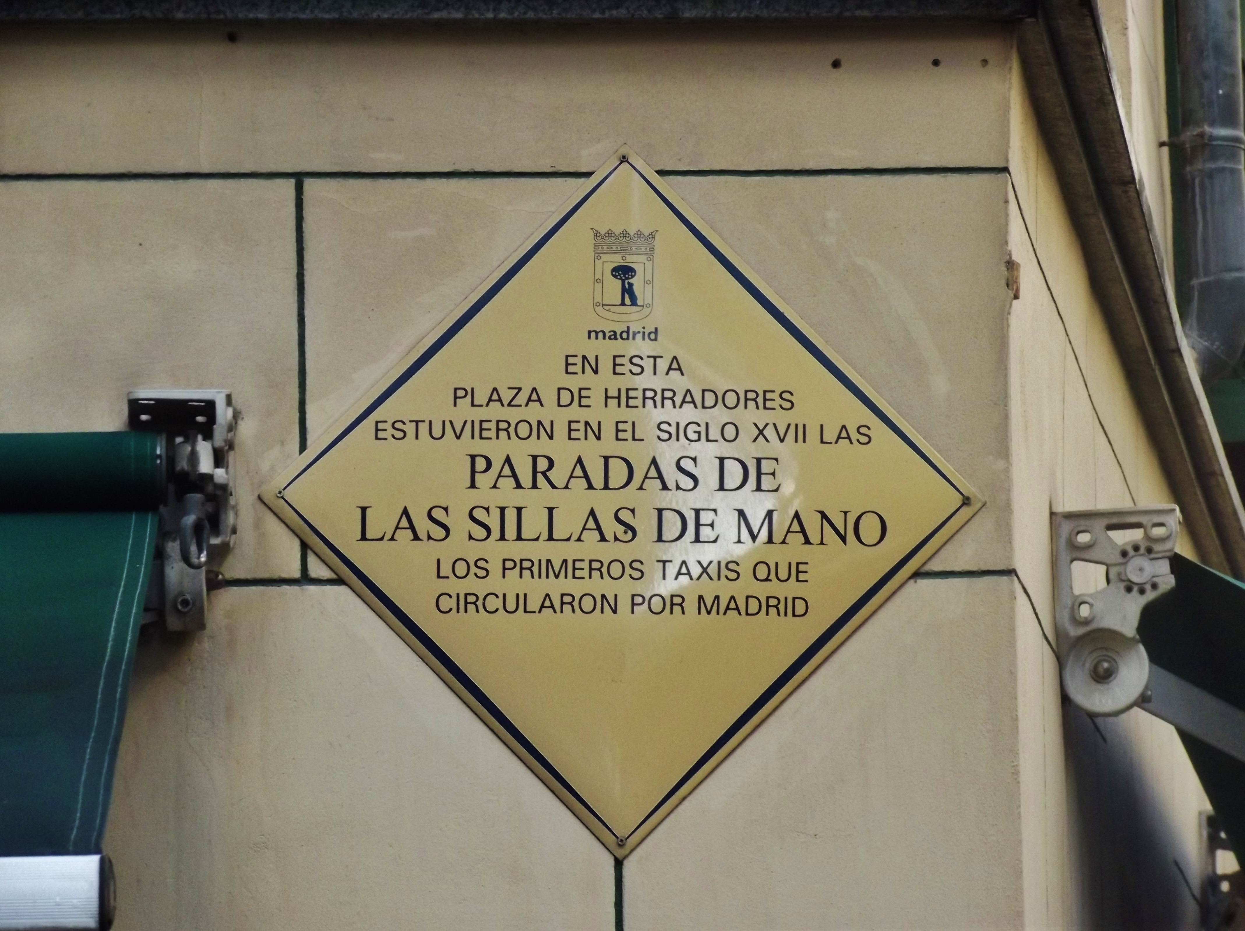 En esta plaza de Herradores estuvieron en el siglo XVII las Paradas de las Sillas de Mano, los primeros taxis que circularon por Madrid